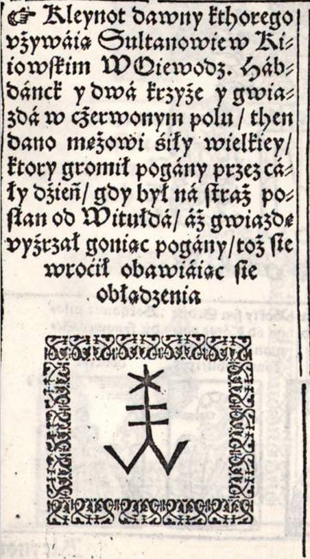 Герб Солтанов в Киевском воеводстве в книге Bartoszа Paprockiego "Gniazdo cnoty: zkąd herby rycerstwa sławnego Krolestwa Polskiego, Wielkiego Księstwa Litewskiego, Ruskiego, Pruskiego, Mazowieckiego, Zmudzkiego y inszych Państw do tego Krolestwa nalezacych Książąt y Panow poczatek swoy maią". Kraków: 1578, s. 1131